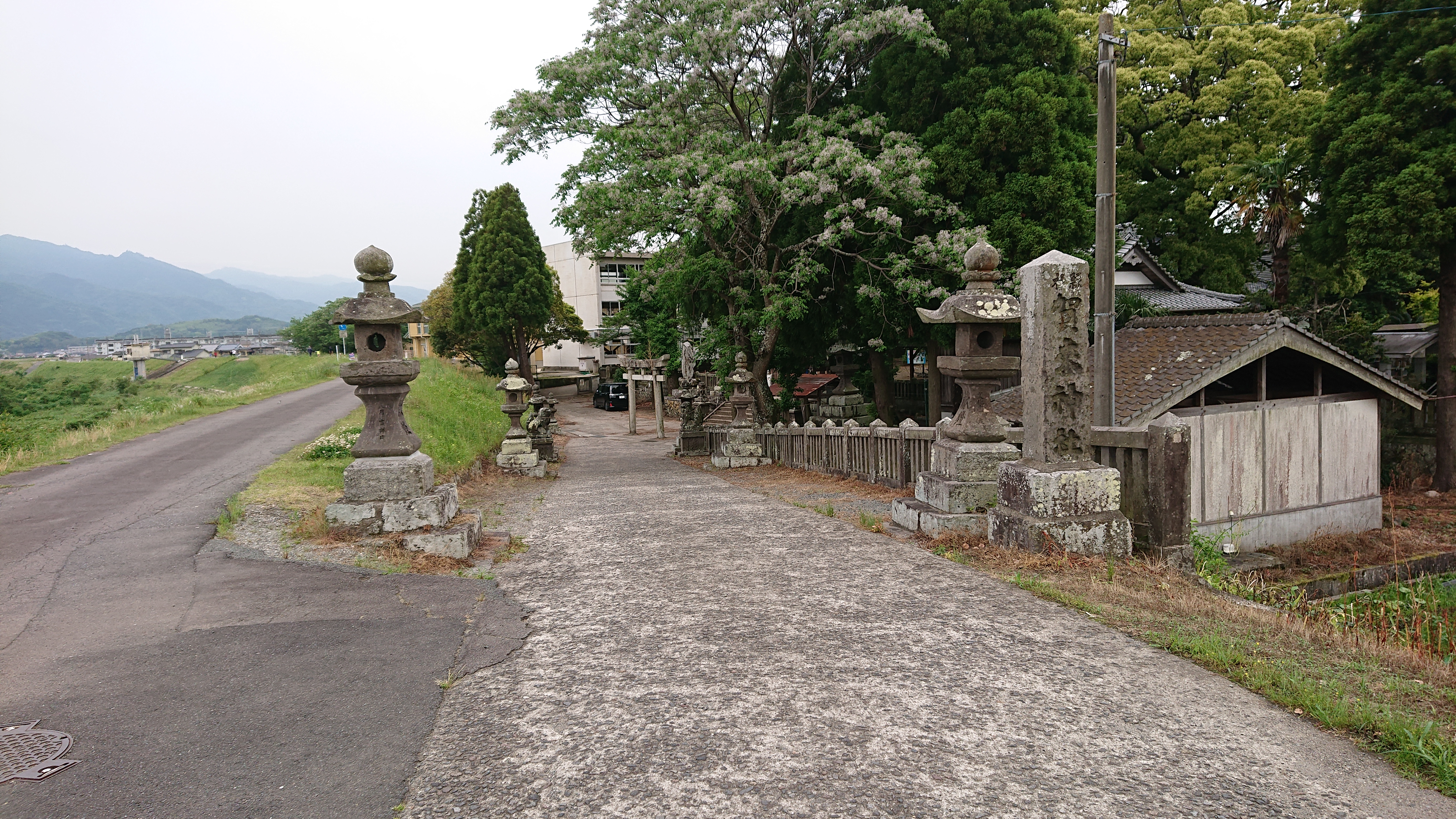 大分川堤防にある、賀来神社の入口